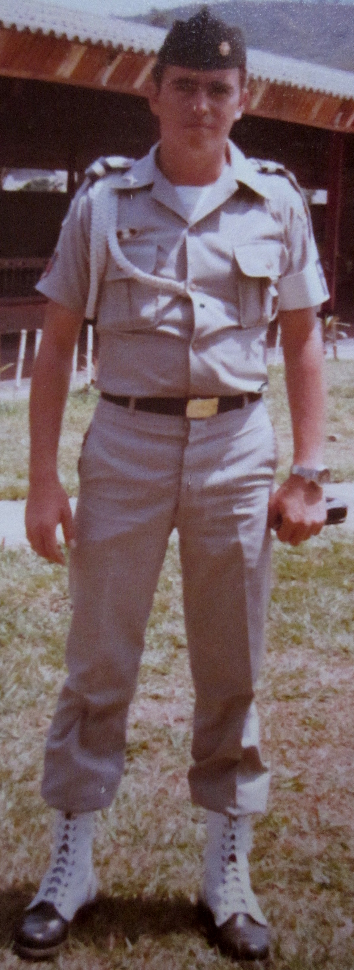 Uniforme de Policia Militar en prendas blancas 1980